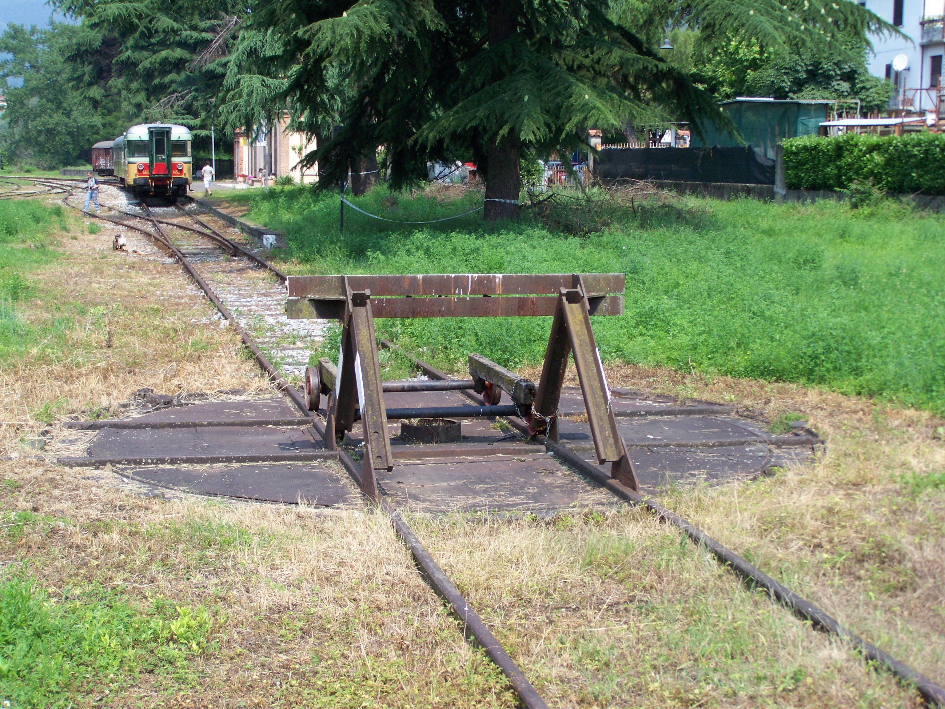 La piattaforma girevole del 1876 presente nella stazione di Paratico-Sarnico. Sullo sfondo la ALn 668.1452+ALn 668.1401 e il fabbricato viaggiatori della stazione.